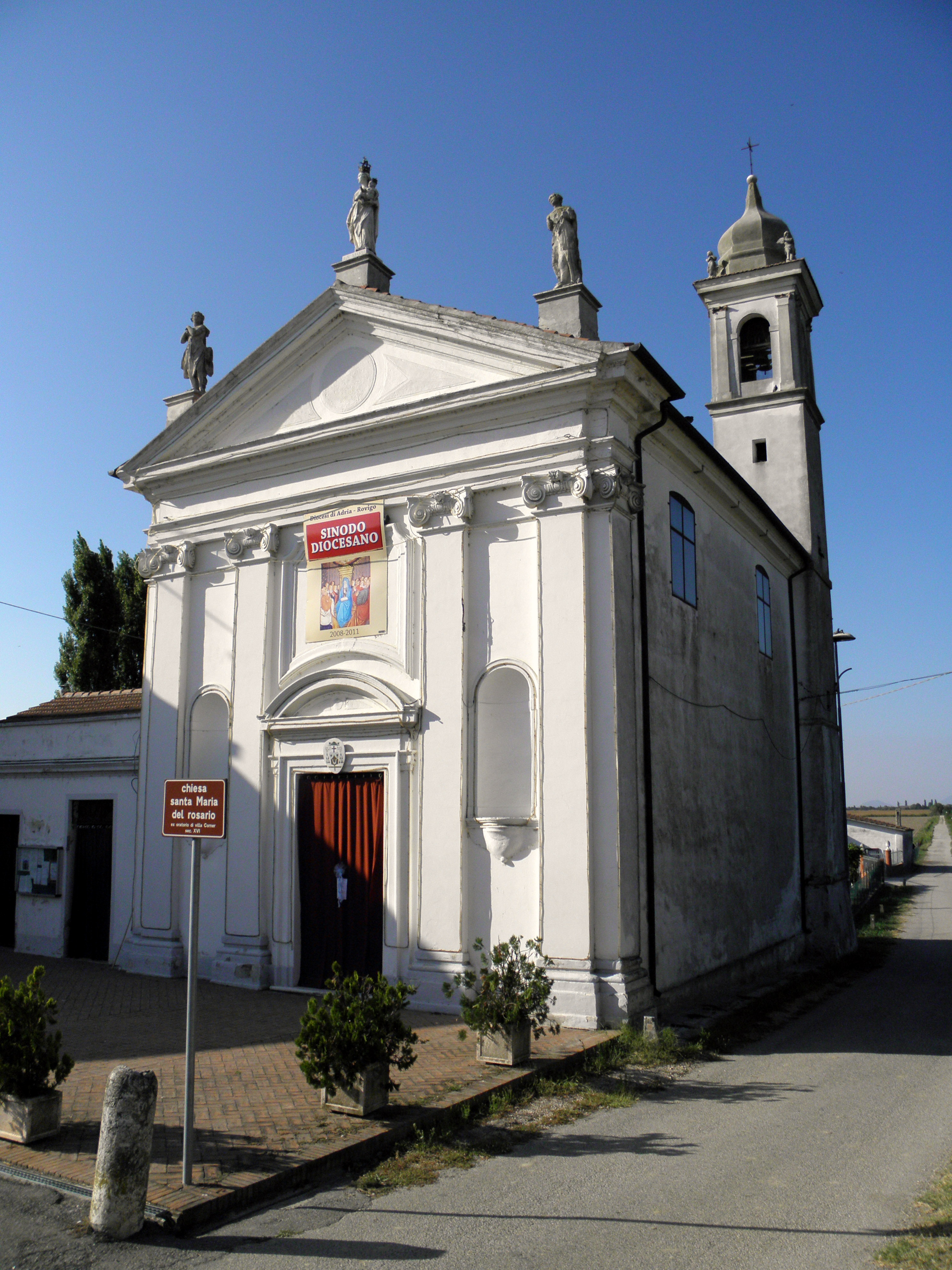 Paolino, frazione di Fratta Polesine: la chiesa parrocchiale di Santa Maria del Rosario, già cappella gentilizia di Villa Corner.